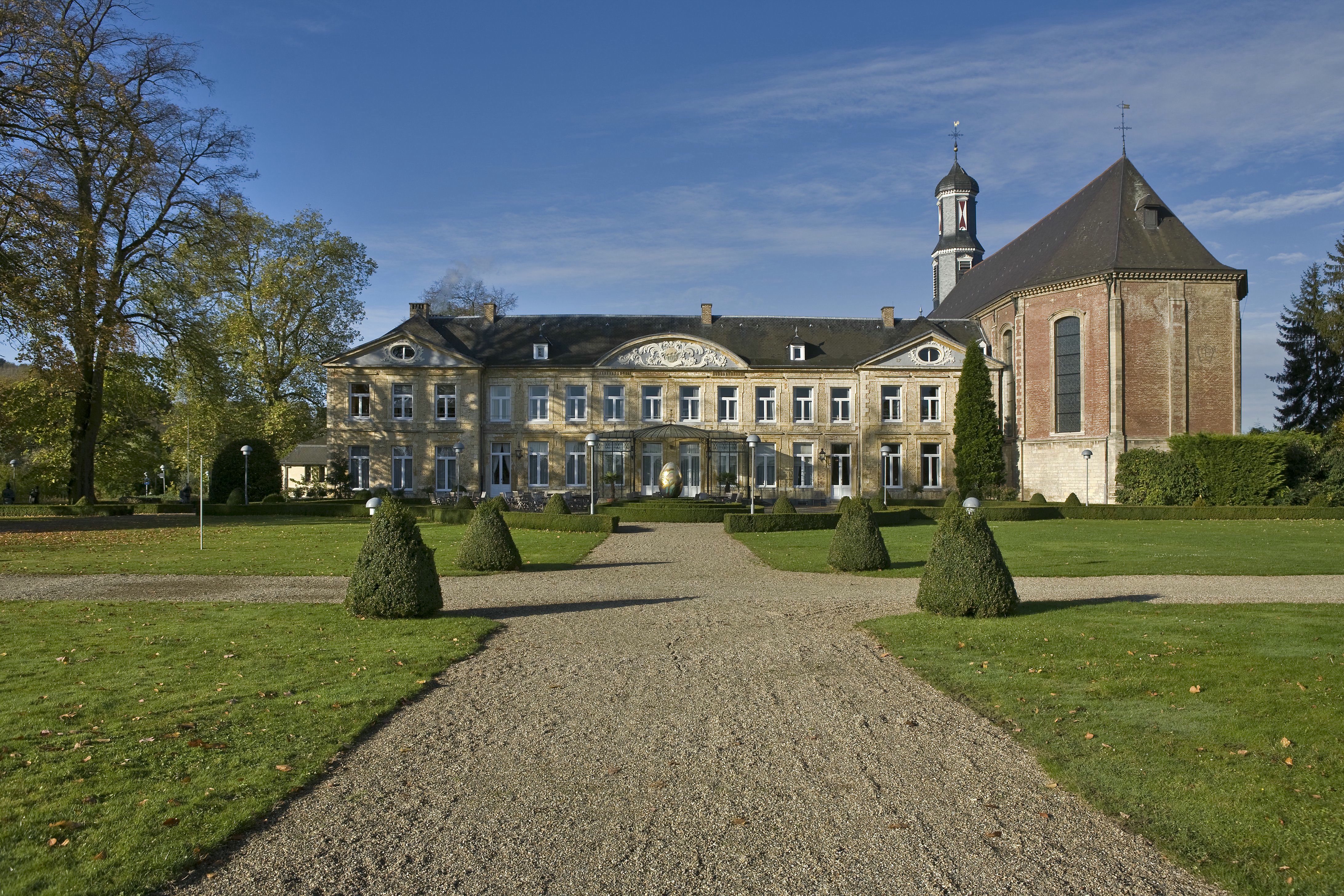 Kasteel Van Sint Gerlach: Overzicht voorgevel Proostenhuis met rechts de kerk (opmerking: Gefotografeerd voor publikatie voor het boek Heiligdom / Sanctuary Sint Gerlach.)